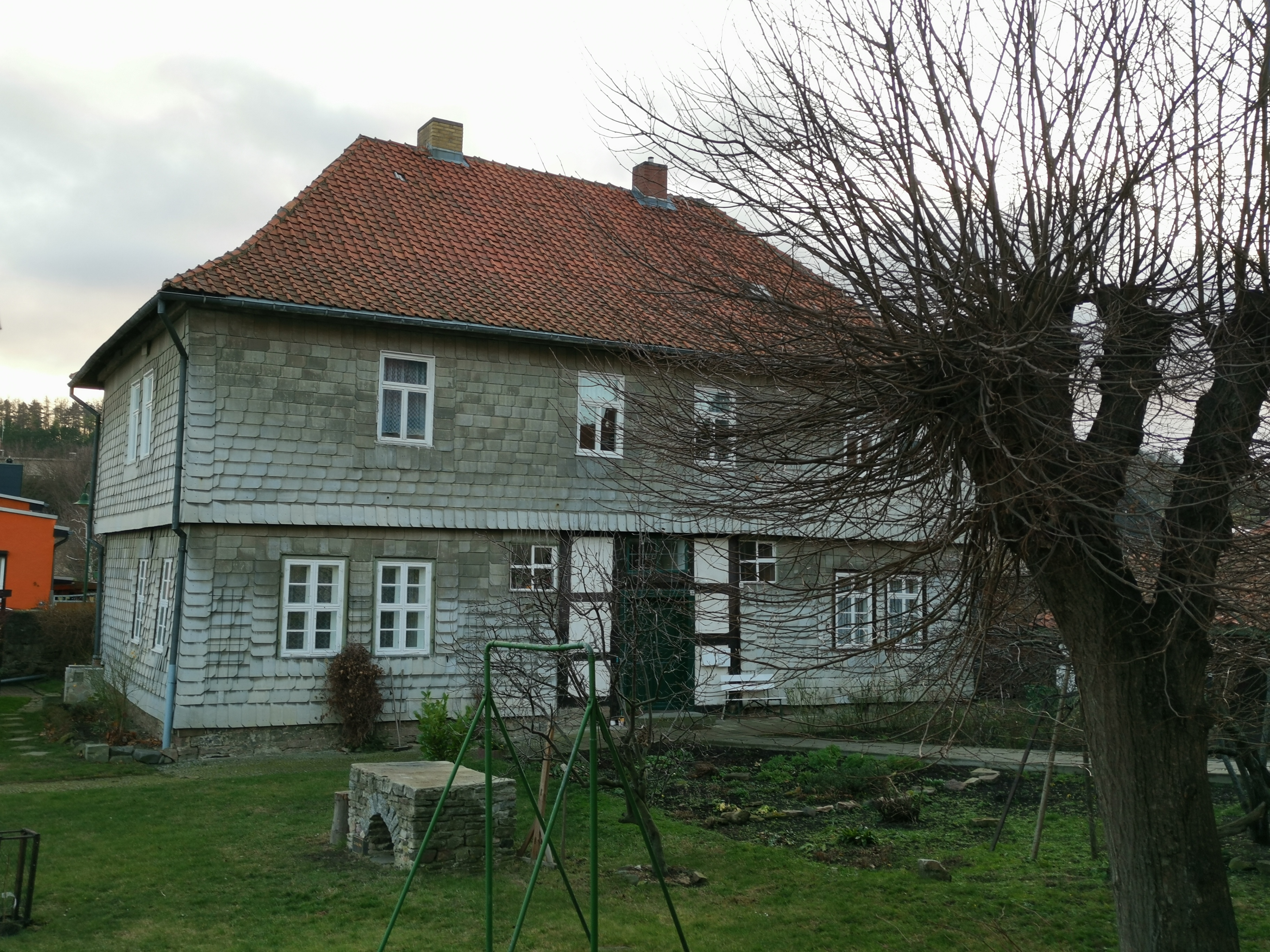 Pfarrhof in Timmenrode Kirchstraße 10